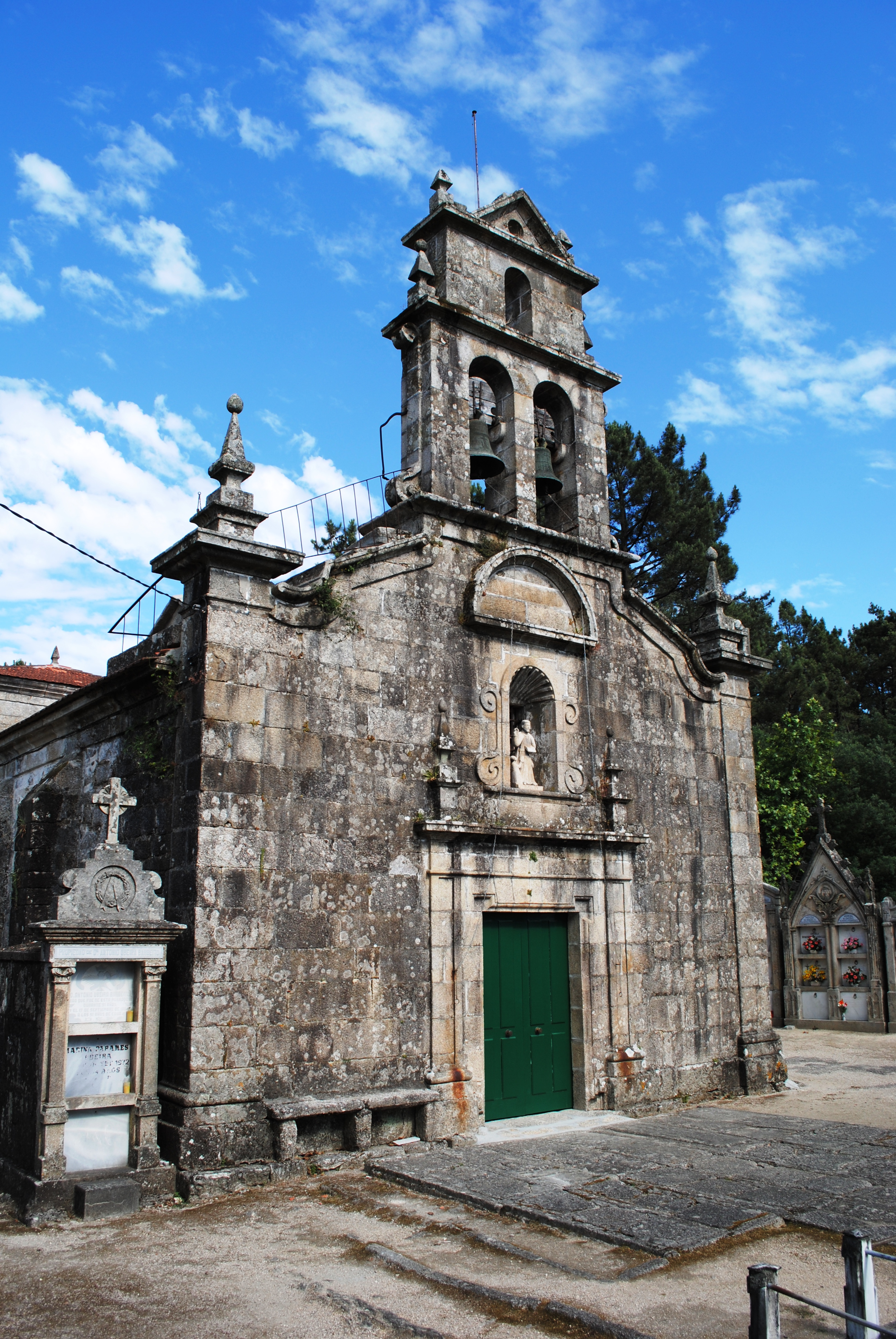 San Mateo de Oliveira, Ponteareas, igrexa parroquial.